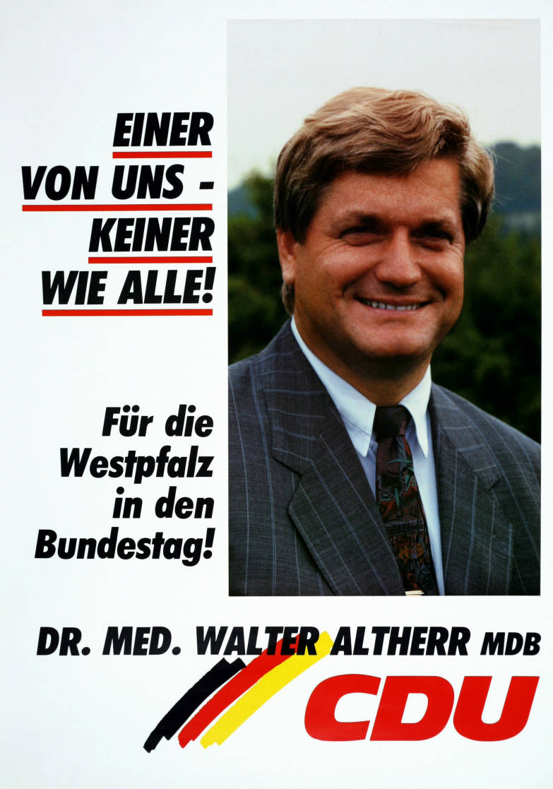 Einer von uns - Keiner wie alle! Für die Westpfalz in den Bundestag! Dr. med. Walter Altherr MdB CDUAbbildung:Porträtfoto - NationalfarbenPlakatart:Kandidaten/Personenplakat mit Objekt-Signatur:10-001: 5054Bestand:Plakate zu Bundestagswahlen (10-001)GliederungBestand10-18:Plakate zu Bundestagswahlen (10-001) » Die 13. Bundestagswahl am 16. Oktober 1994 » CDU » Mit PorträtfotoLizenz:KAS/ACDP 10-001: 5054 CC-BY-SA 3.0 DE